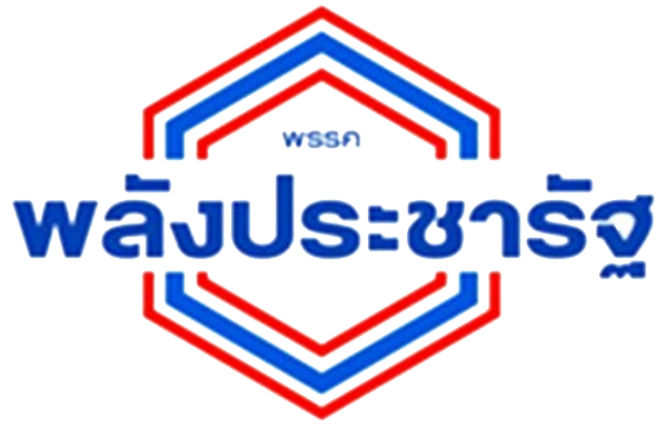 พรรคพลังประชารัฐ